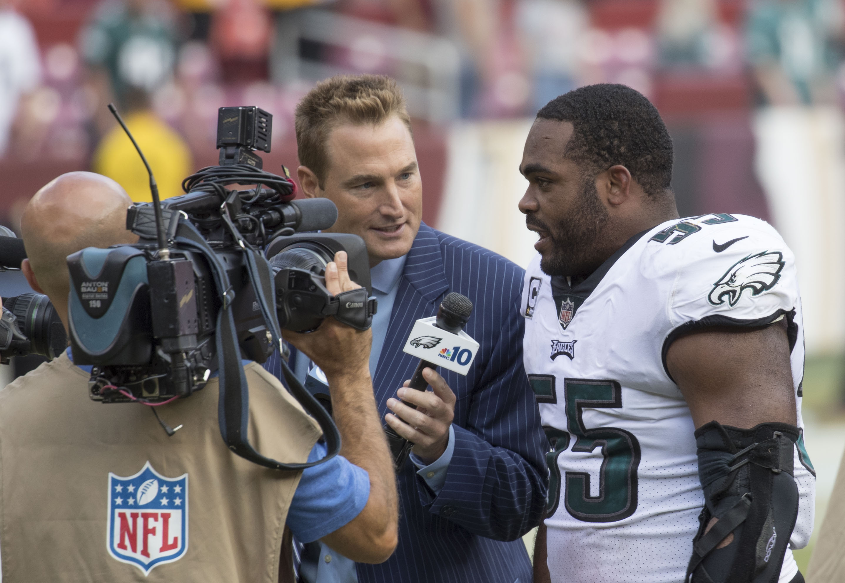 Eagles at Redskins 9/10/17